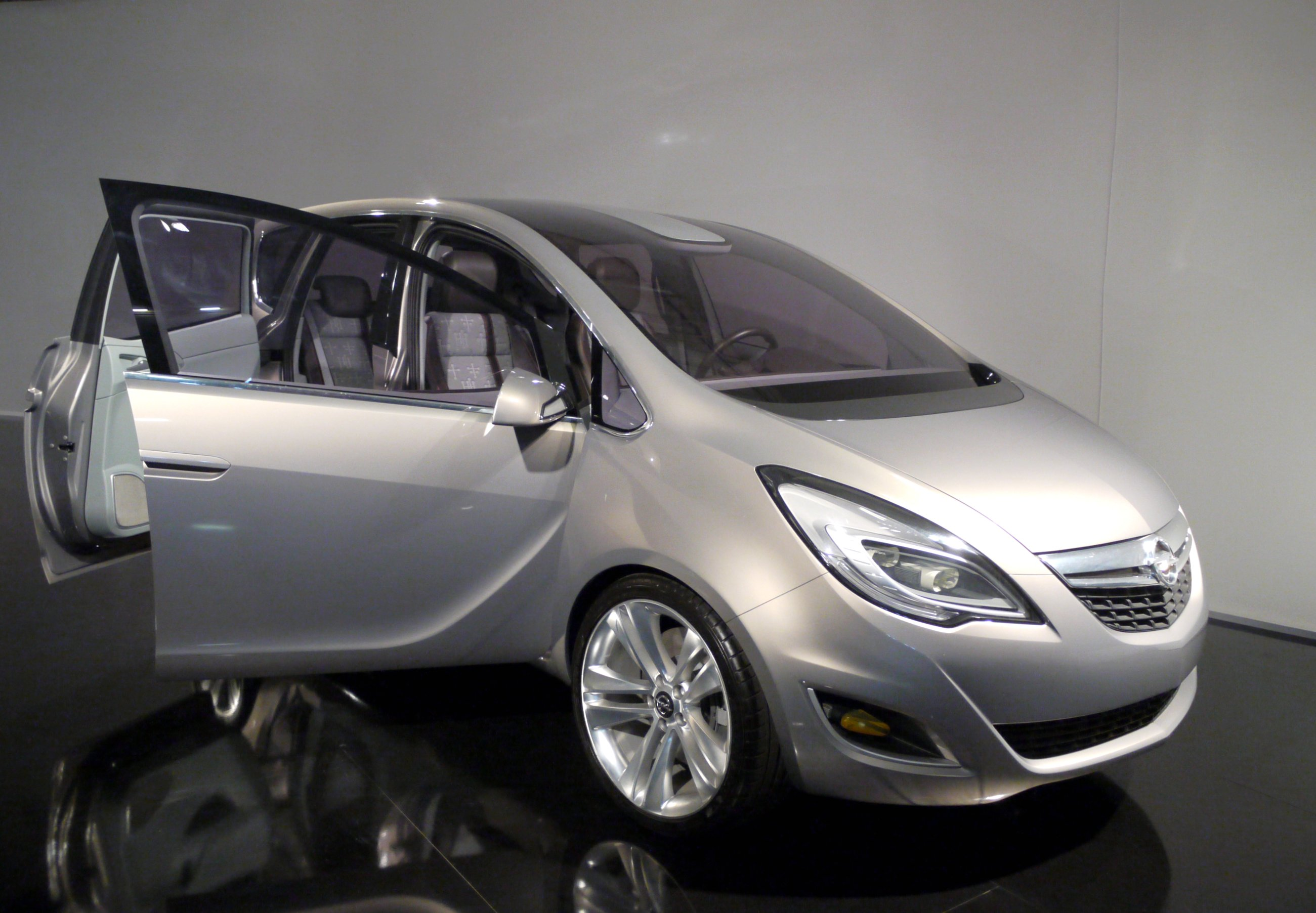 2007 Opel Meriva concept.